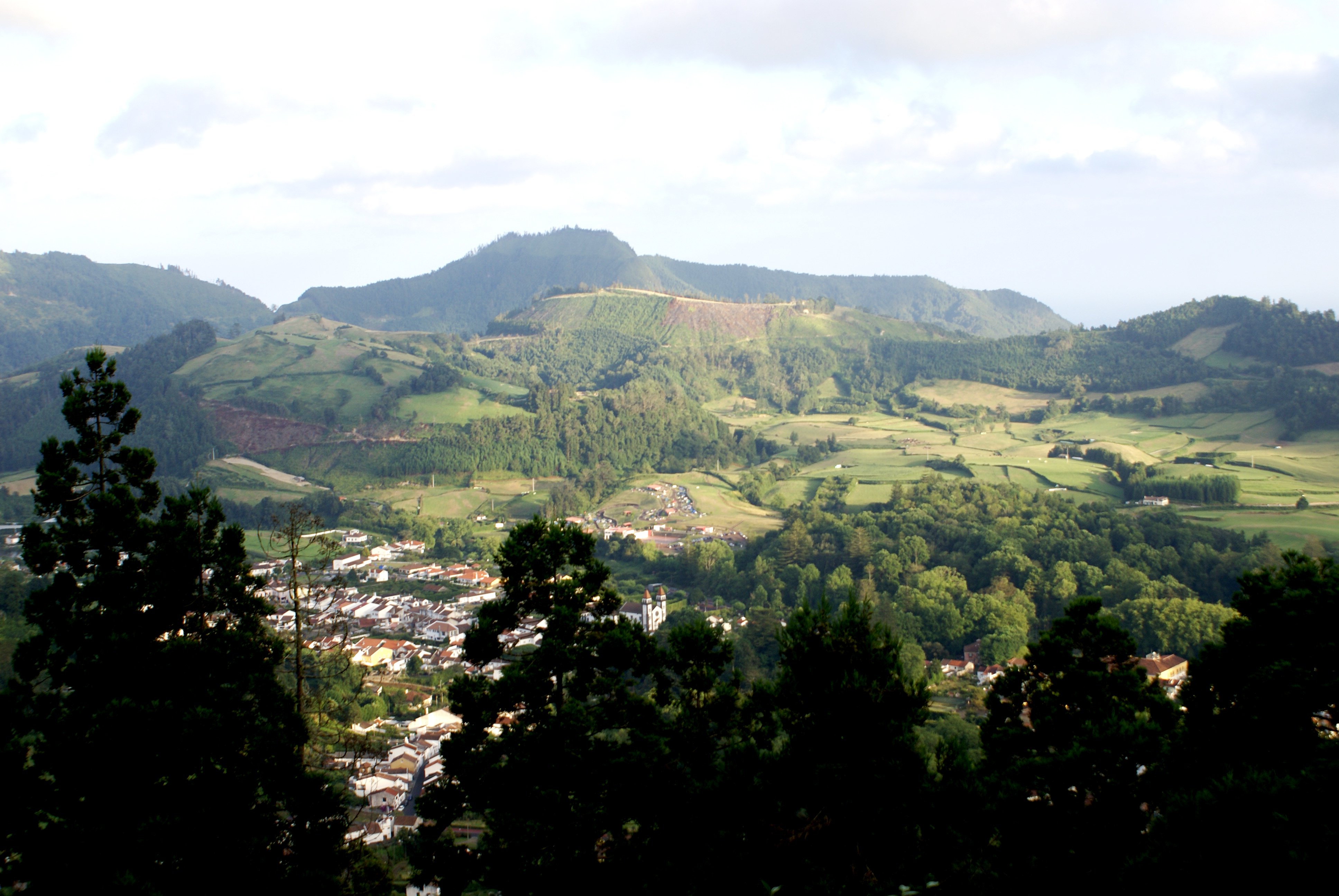 Miradouro das Pedras do Galego, Furnas, Povoação, ilha de São Miguel, Açores